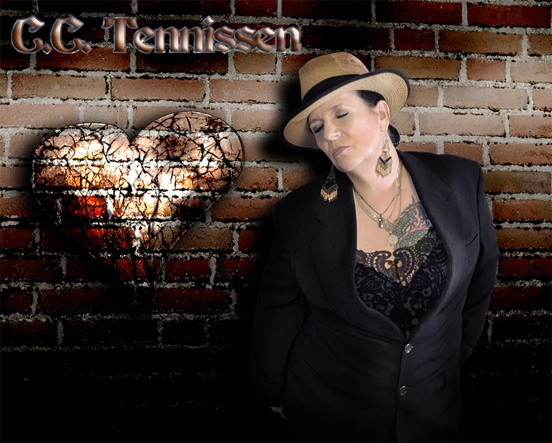 C.C.Tennissen Fotoshoot